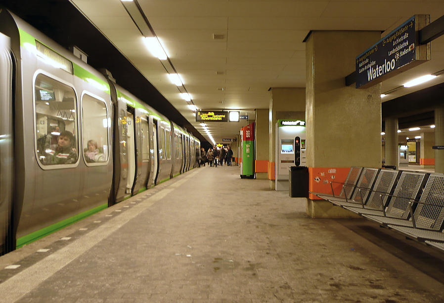 Stadtbahnstation Waterlooplatz